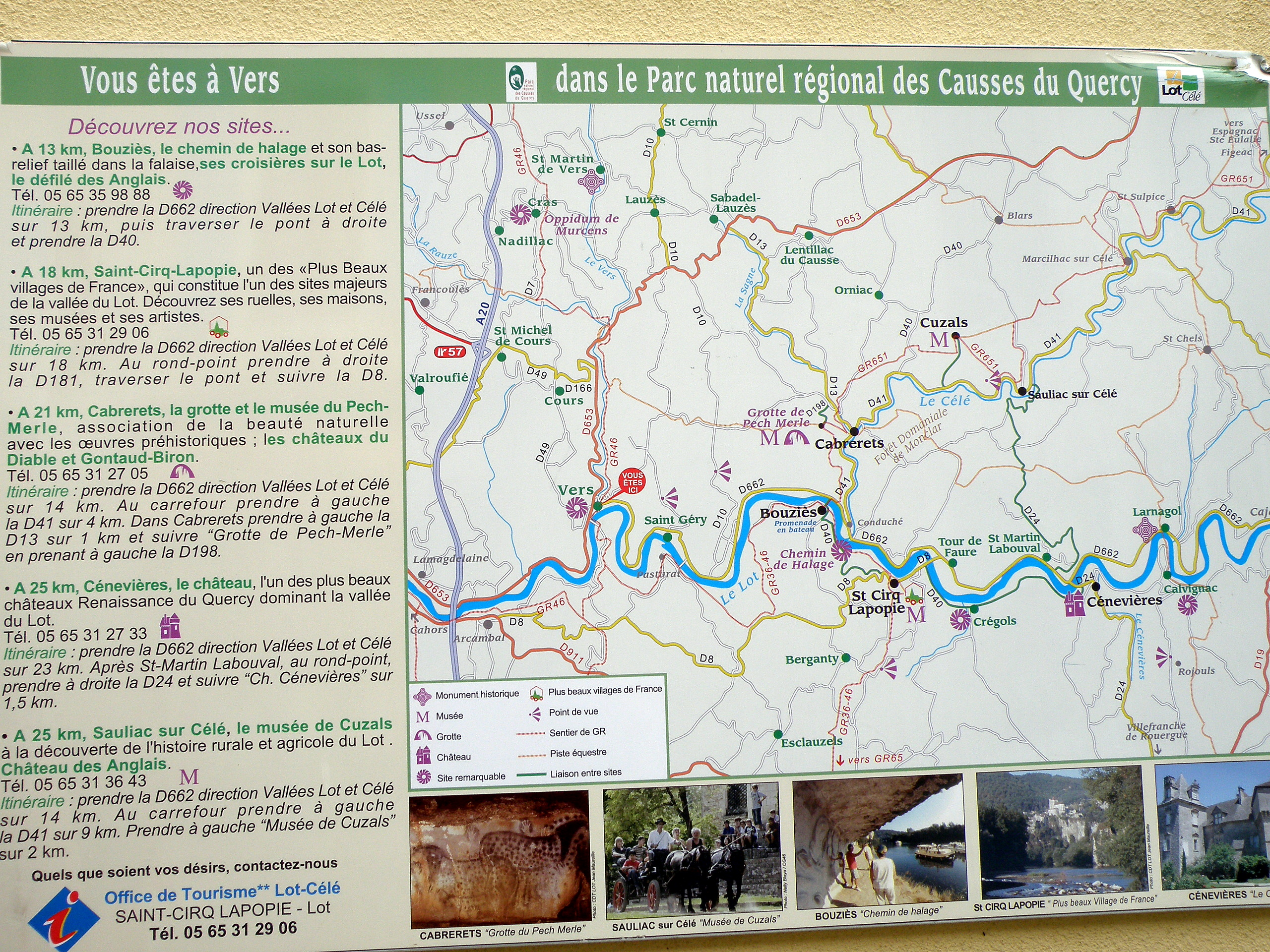 Plan du Parc naturel régional des Causses du Quercy. Photo d'un panneau apposé sur la voie publique à Vers (Lot).